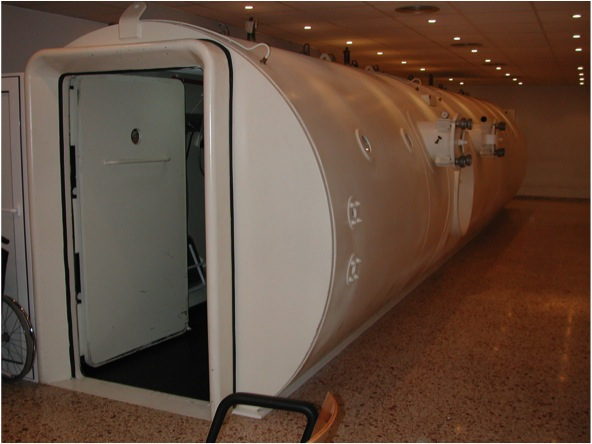 Cámara Hiperbárica Multiplaza. Medibarox. Hospital Perpetuo Socorro. Alicante